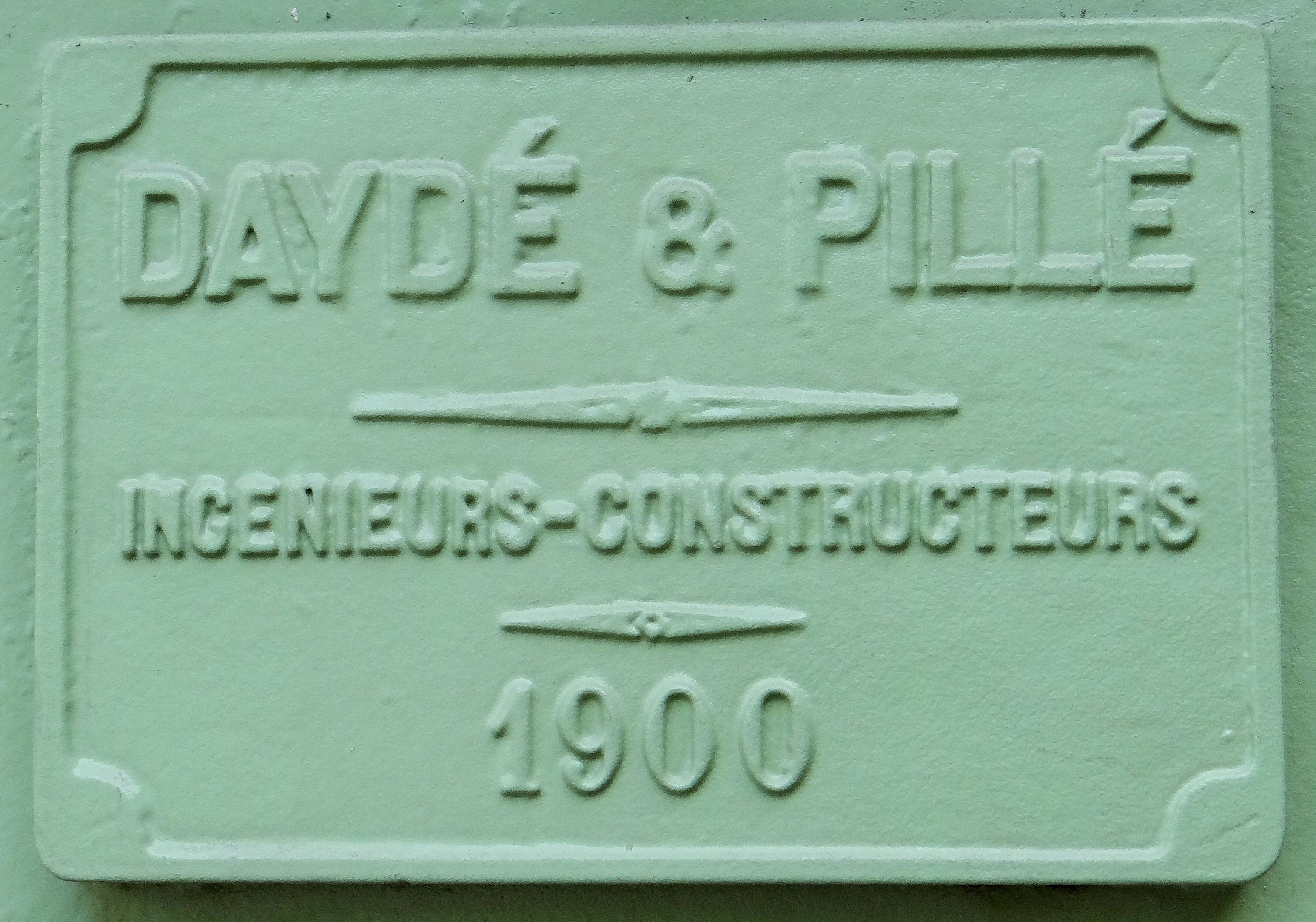 Plaque constructeur "Daydé et Pillé, ingénieurs-constructeurs, 1900" dans la nef, Grand Palais .